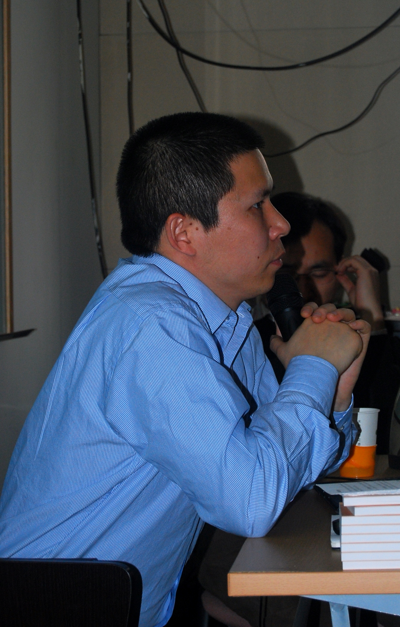 许志永在北京的一个讲座上